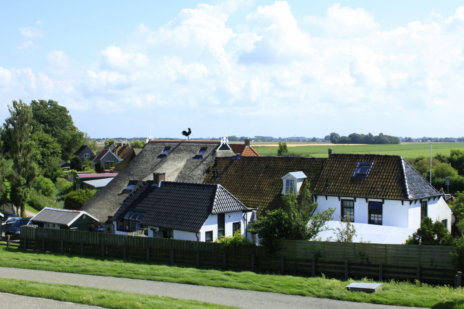 Vanaf de dijk zien we het buurtschap Zwartehaan op de Nieuwe Bildtdijk die is aangelegd in 1715 in de Gemeente Het Bildt. Het buurtschap behoord tot het dorp Sint- Jacobaparochie in Friesland.